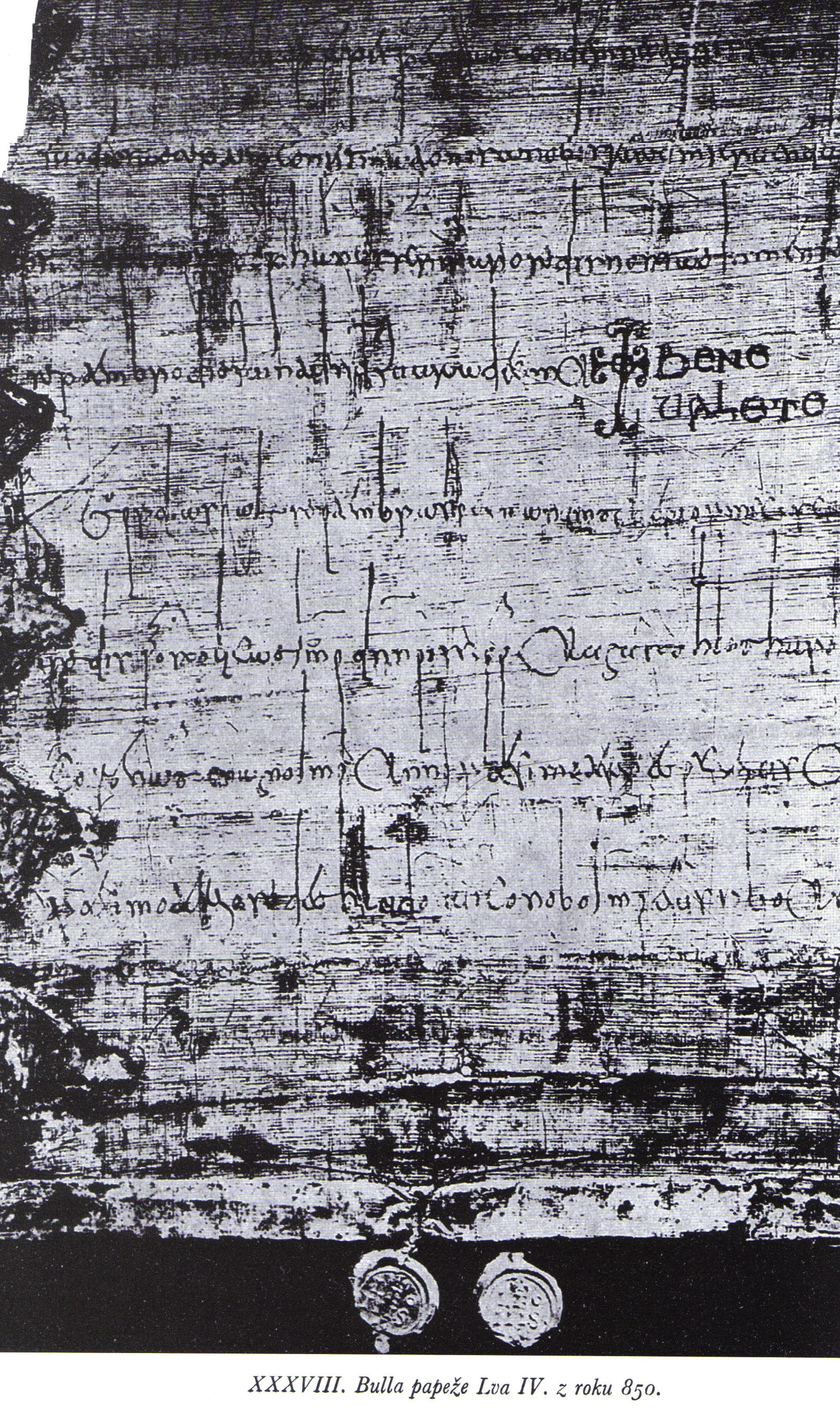 Česky: Bula papeže Lva IV. z roku 850